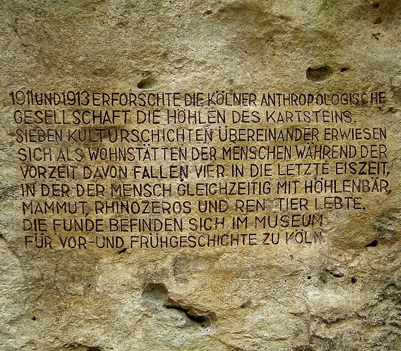 Kakushöhle in Mechernich